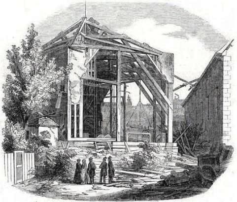 "Ruines des bâtiments du réservoir de gaz rue Richer, après l'explosion du 25 octobre 1849".